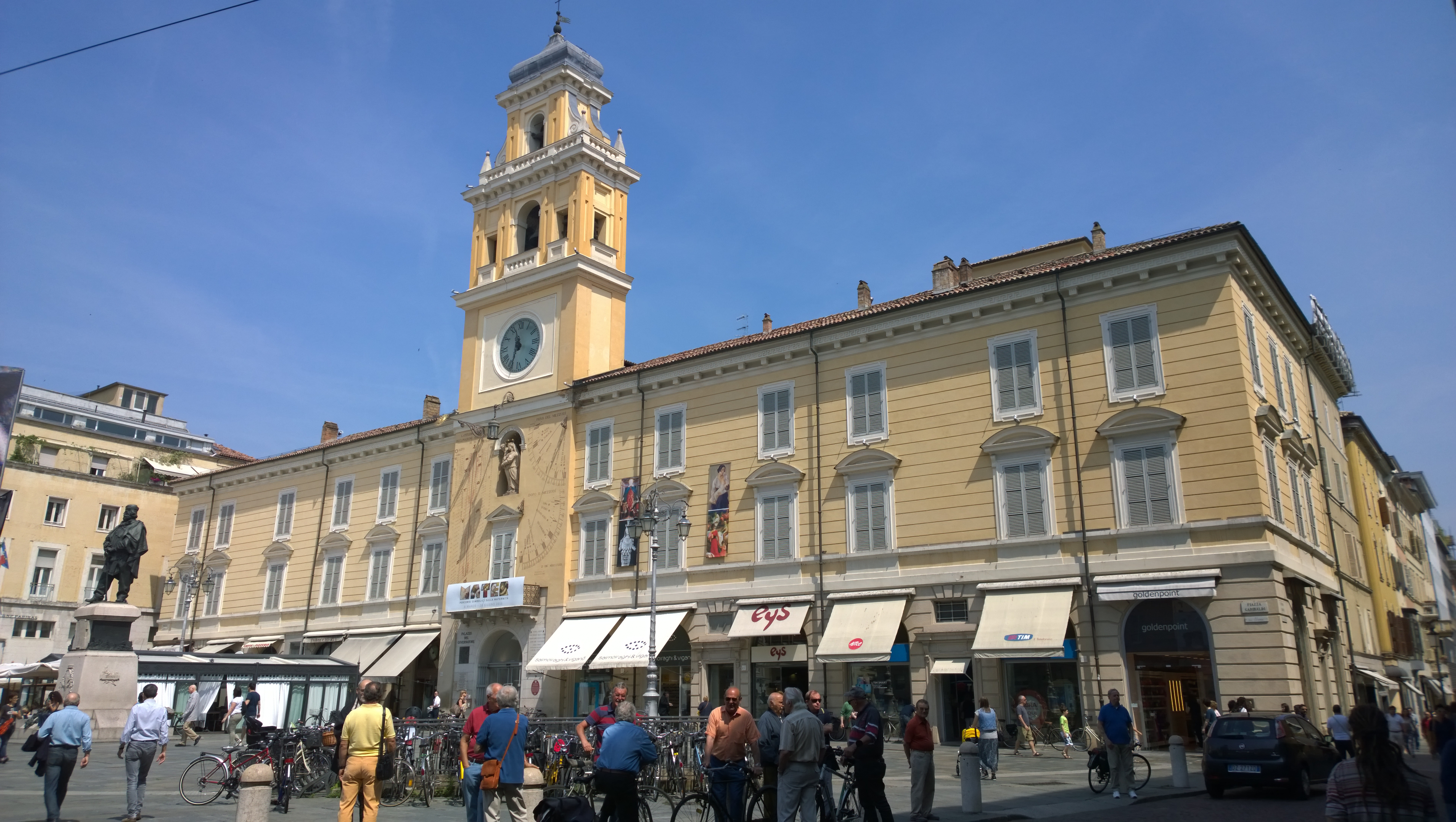 Palazzo del Governatore This is a photo of a monument which is part of cultural heritage of Italy.